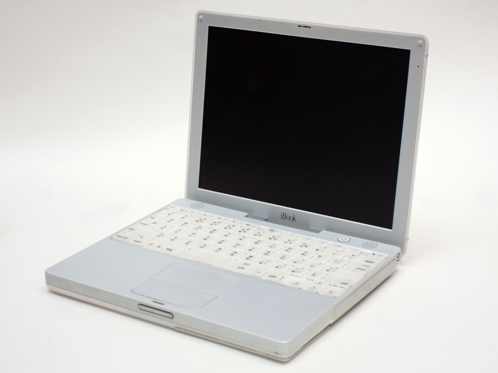 Apple iBook G3 M6497 JapanModel G3 500MHz/128MB/10GB/DVD